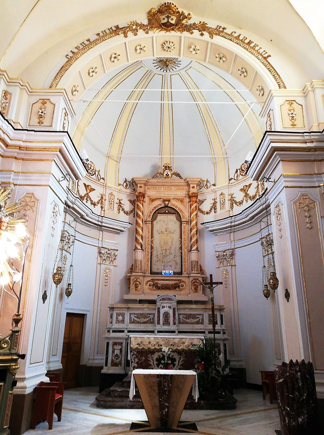 Abside